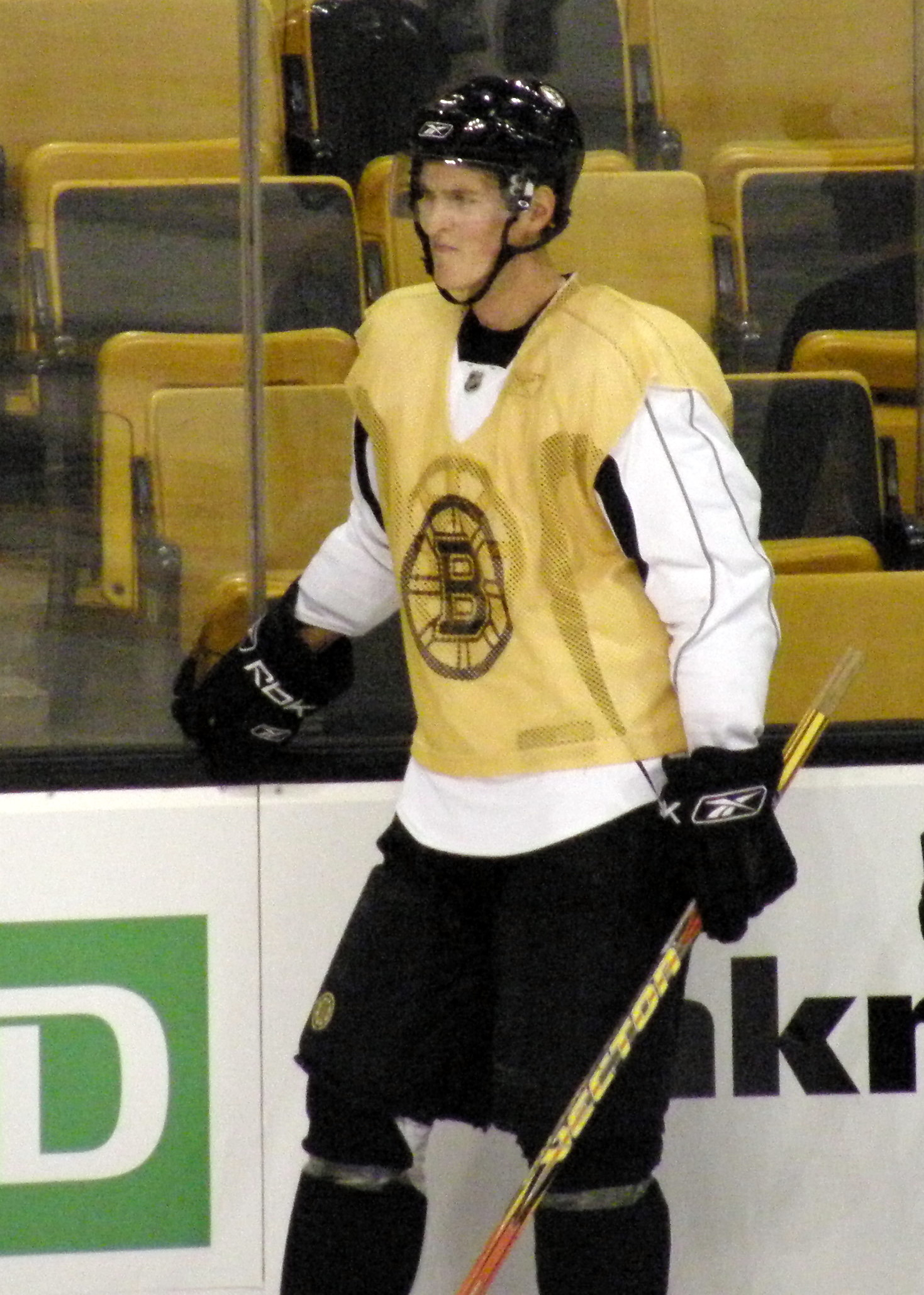 68 Mikko Lehtonen (RW)